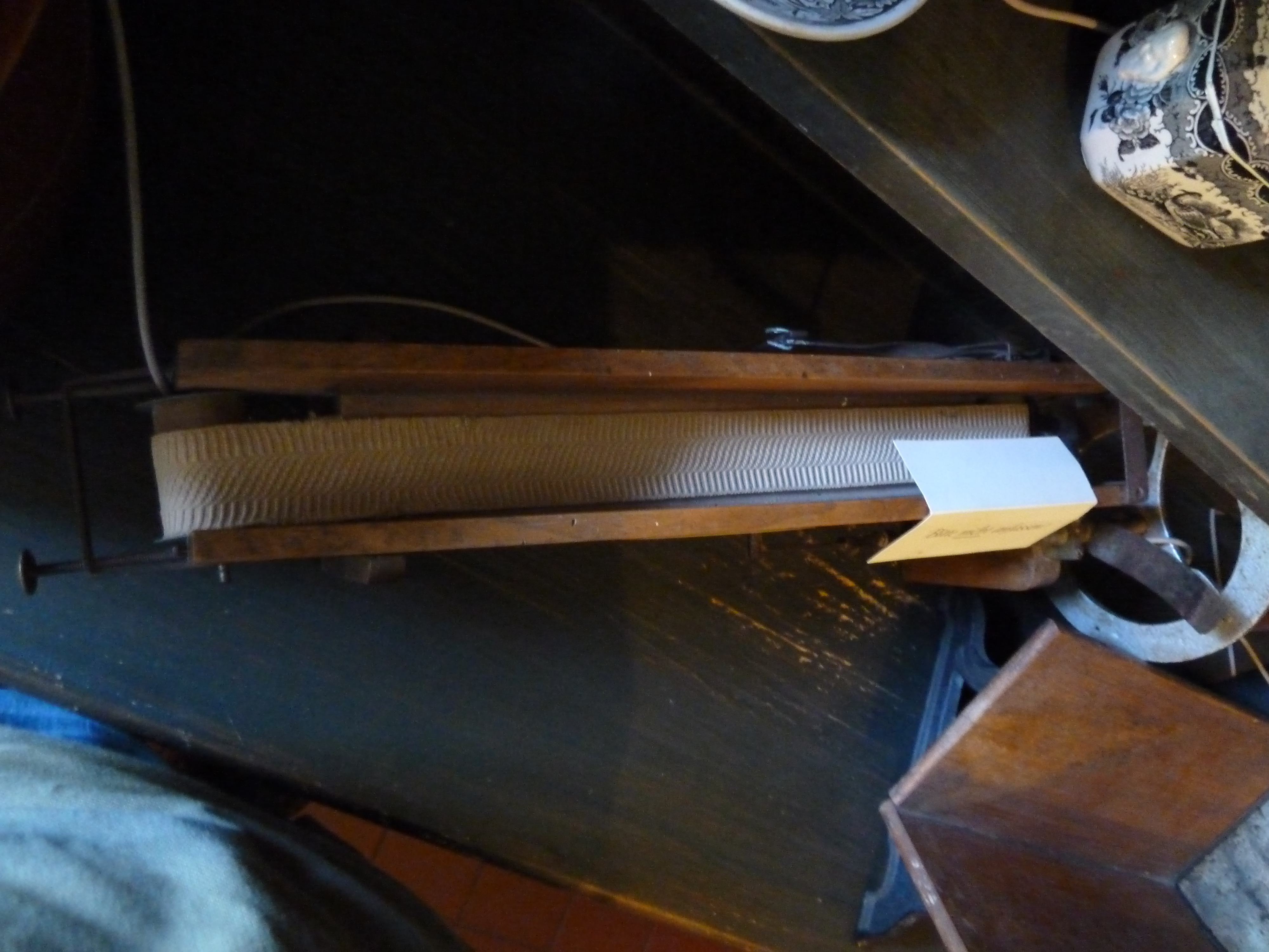 im Heimatmuseum Hüsli in Grafenhausen-Rothaus